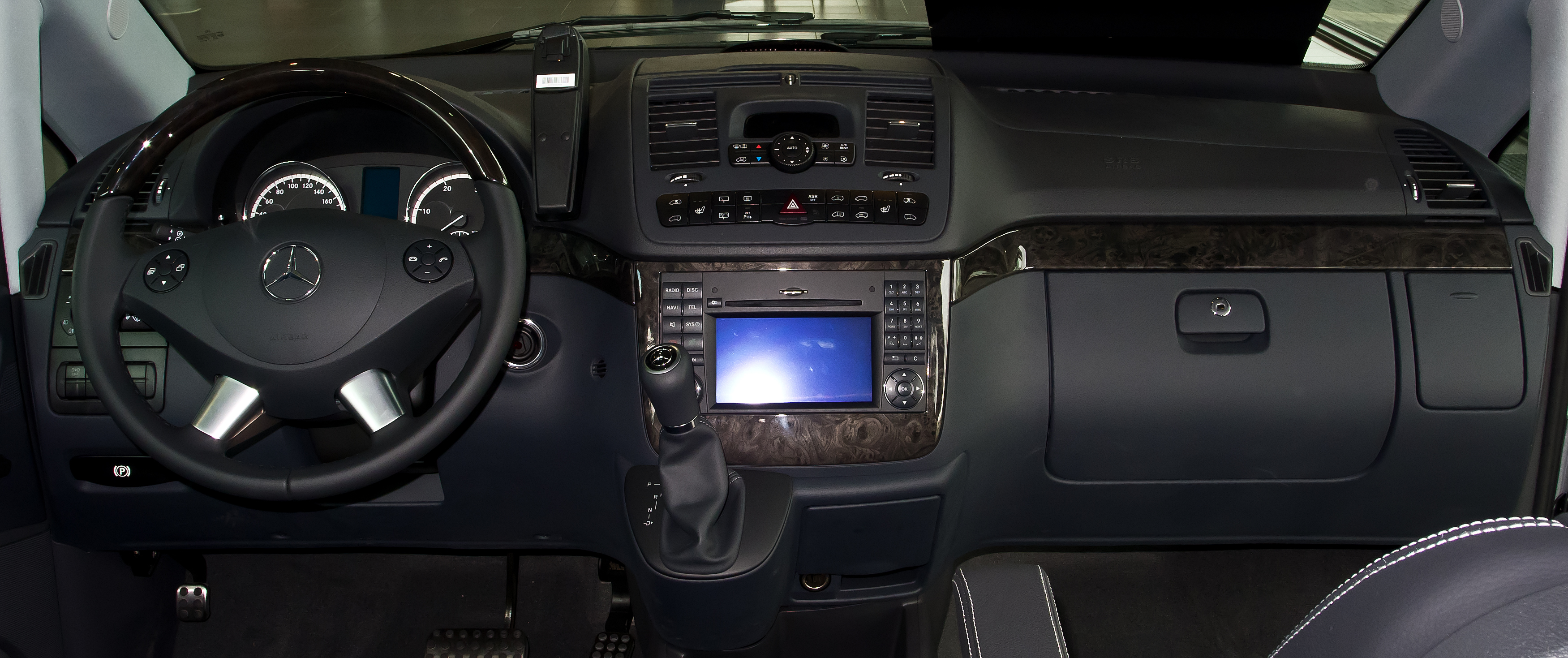 Mercedes-Benz Viano Lang CDI 3.0 V6 BlueEFFICIENCY Avantgarde Edition 125 (V 639, Facelift)